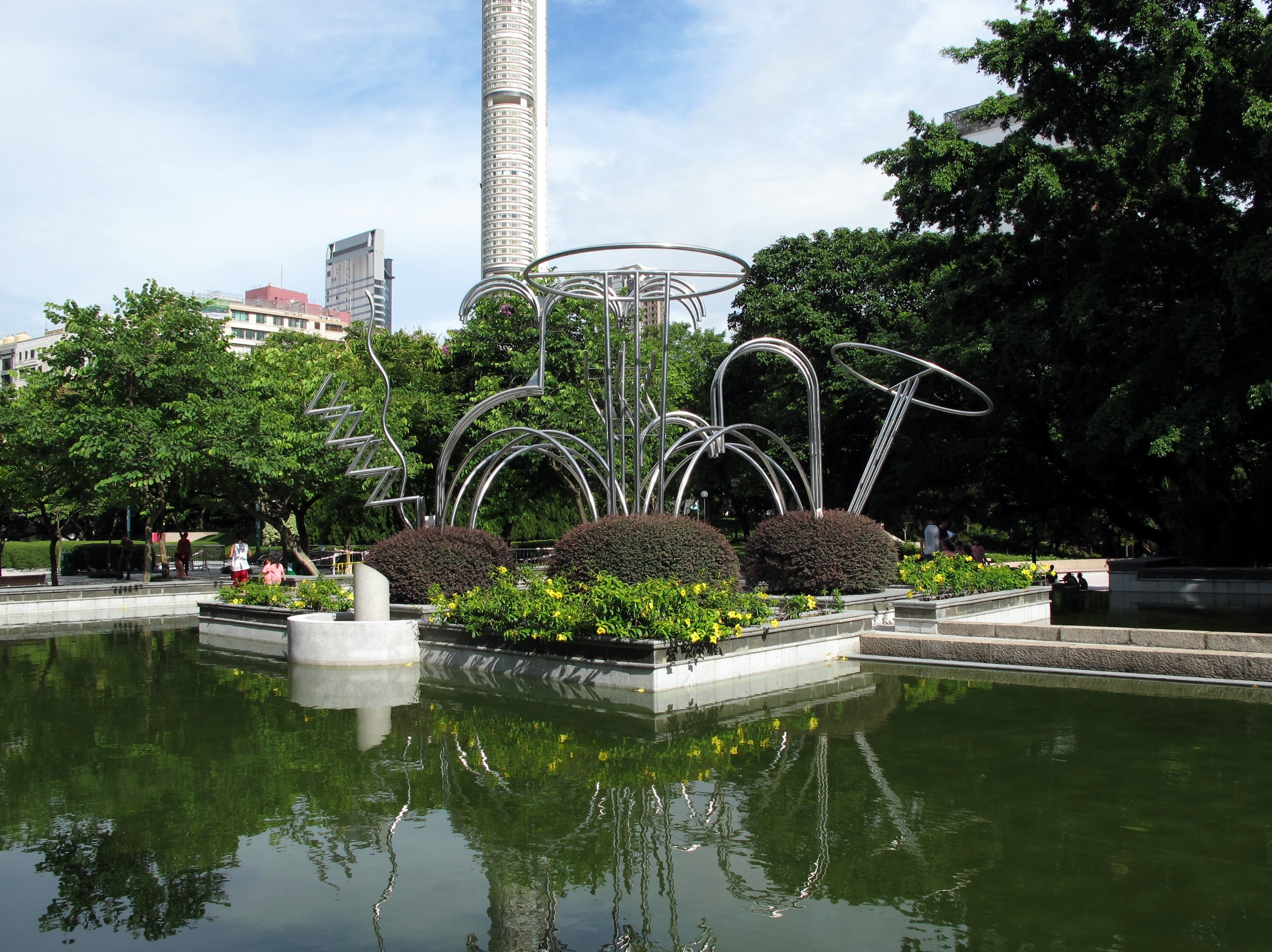 Kowloon Park Pool Pavilion